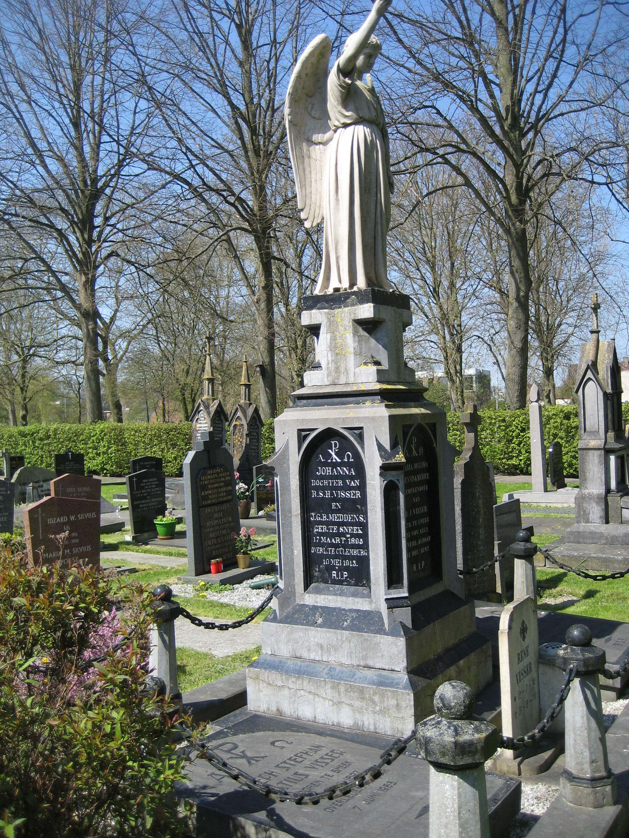 R.K. Begraafplaats St. Martinuskerk, Sneek, Friesland, Nederland. Grafmonument Visser - Meddens - Brenninkmeijer. Rijksmonument 514092